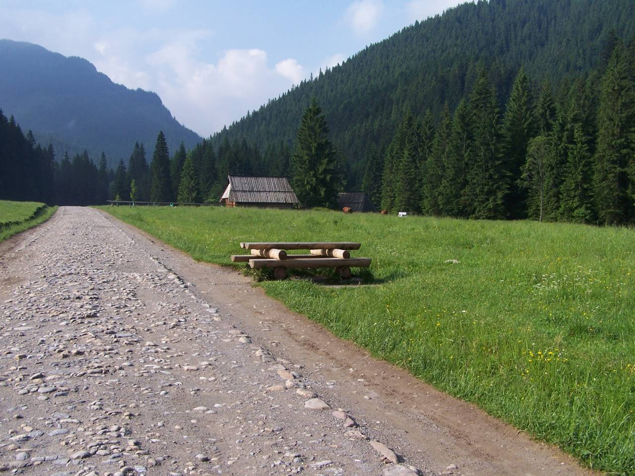 Wyżnia Kira Miętusia (Tatra Mountains)